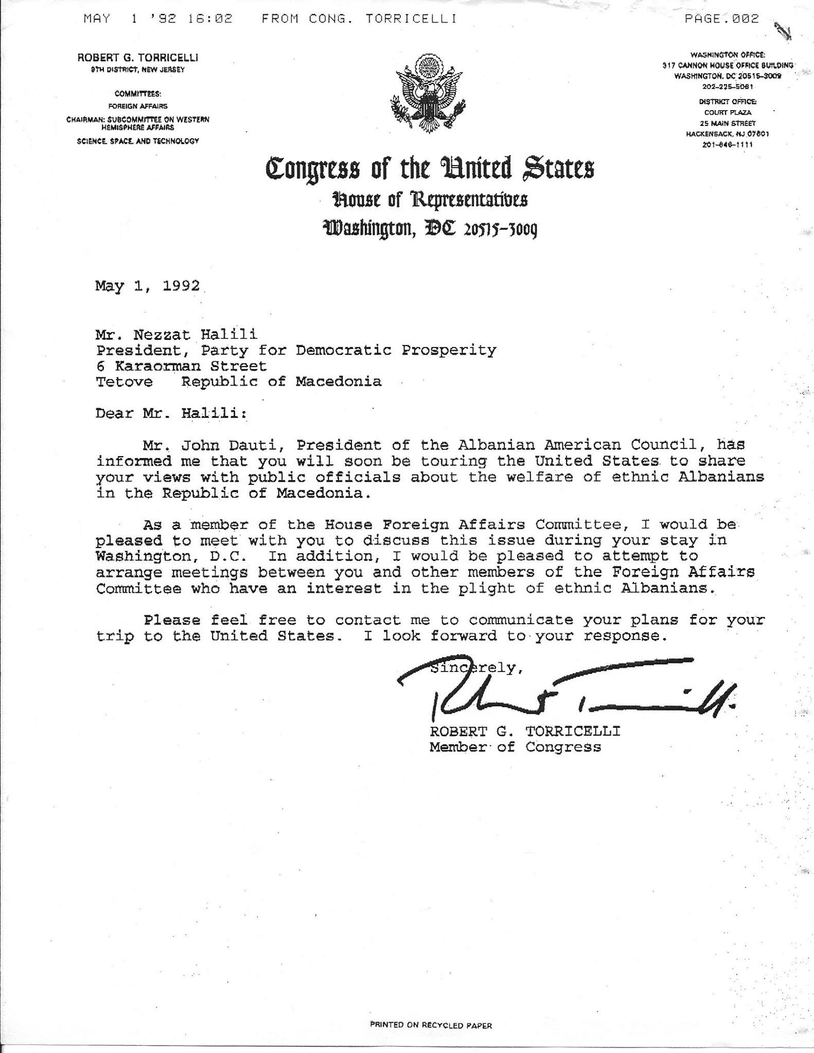 Ftesë dërguar Kryetarit të partisë PPD, z. Nevzat Halili nga Kongresmeni Robert G. Torricelli. Dëshiron të takonte Kryetarin për situatën në (IRJM) Ish Republika Jugosllave e Maqedonisë